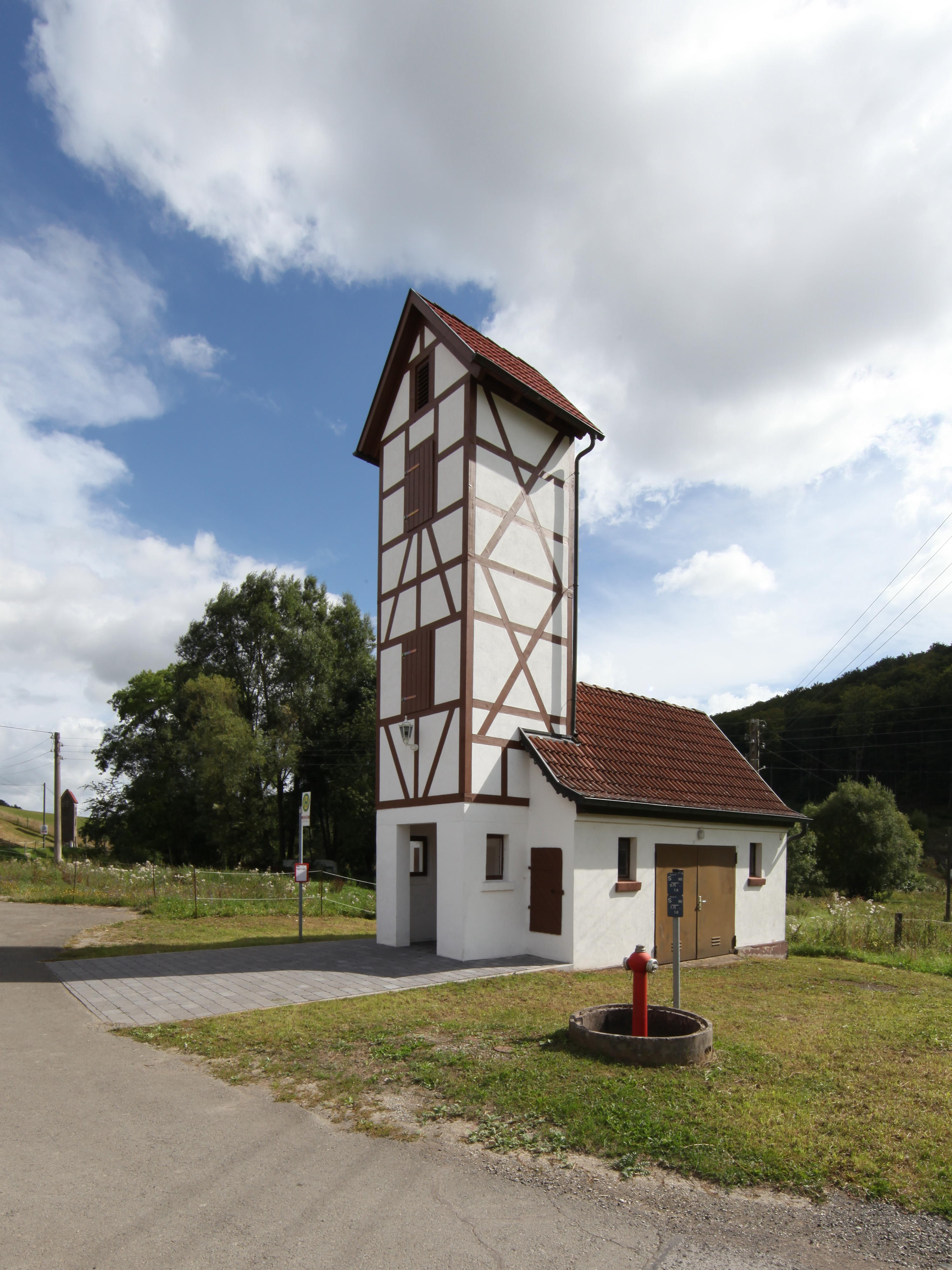 Unterharles, Feuerwehrhaus